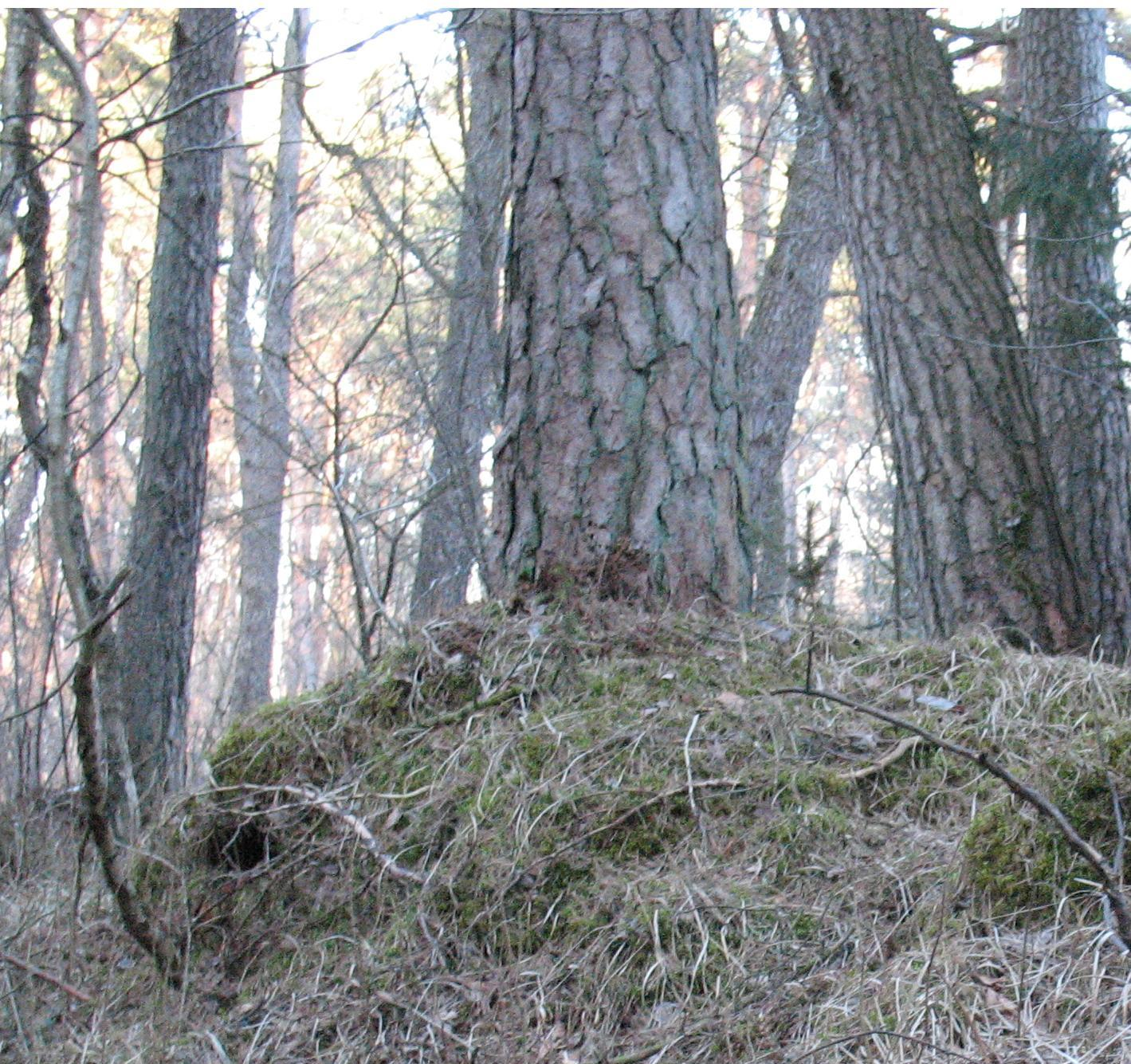 Die Wurzeln der Kiefern im Schwarzhölzl sind aufgeständert